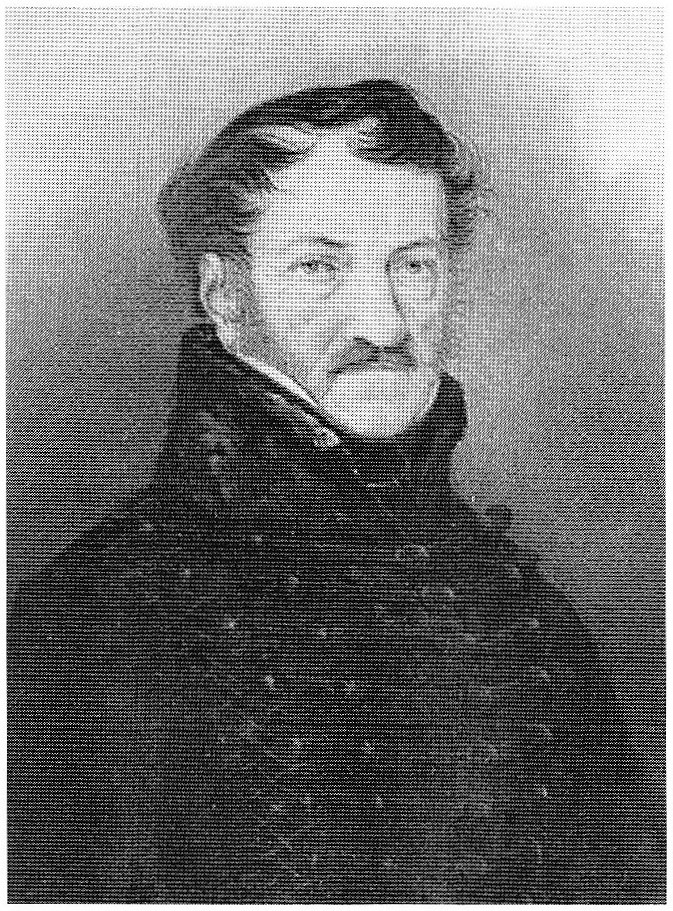 Gemälde von Anton Ludwig Ferdinand von Schaumberg, dem letzten Schlossbesitzer aus der Schaumbergfamilie in Kleinziegenfeld